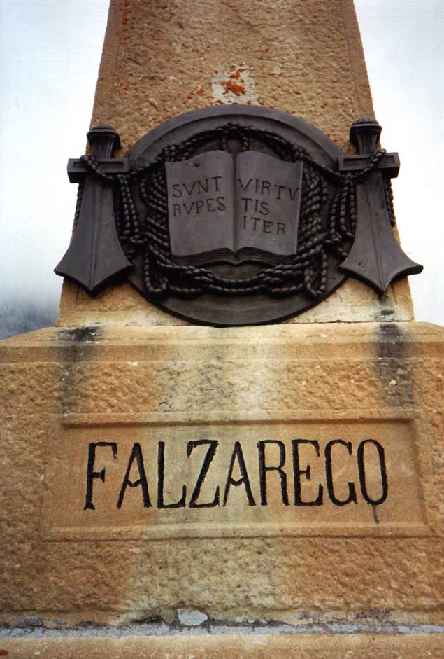 Denkmal auf dem Falzaregopaß "FELSEN SIND DER PFAD DER TUGEND"